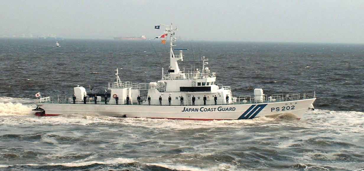 海上保安庁 巡視船 PS202「ほたか」 2006/05/28 第51回海上保安庁観閲式にて つるぎ型巡視船 Japan Coast Guard(JCG) Patrol Vessel Small PS08